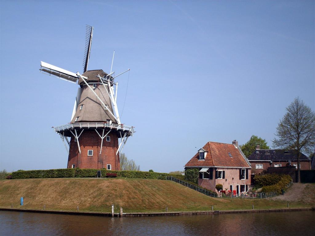 Zeldenrust, windmolen in Dokkum.